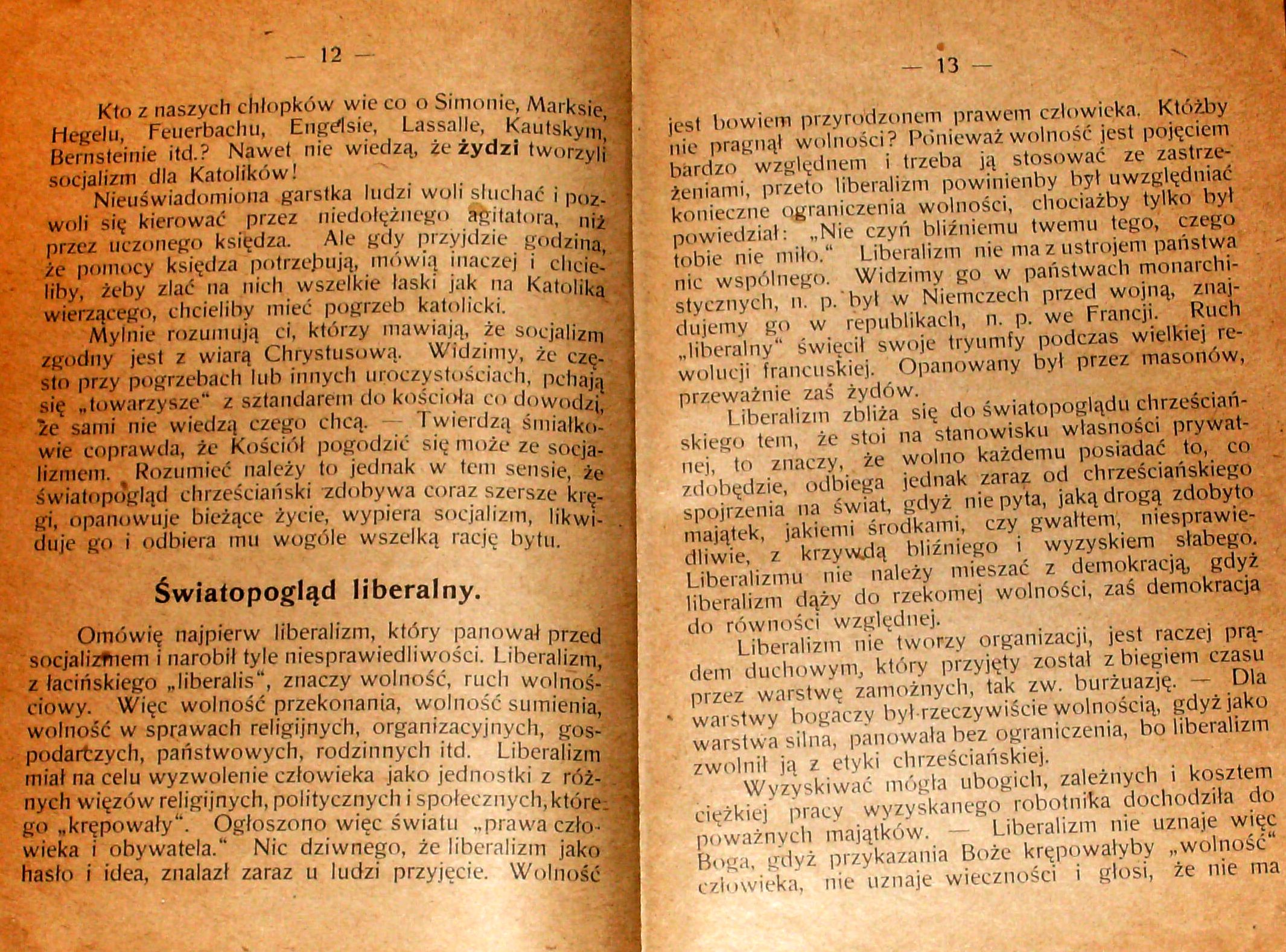 Stanisław Krzyżowski, Rozmyślania w czterdziestą rocznicę encykliki „Rerum novarum”, wydanej 15 maja 1891 r. przez papieża Leona XIII, Pszczyna 1931